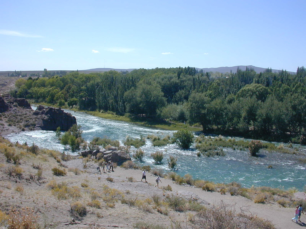 Atuel River, Mendoza Province, Argentina.Río Atuel